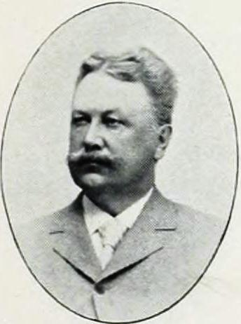 Per Emanuel Huss (1849-1913), svensk jurist och kommunalpolitiker